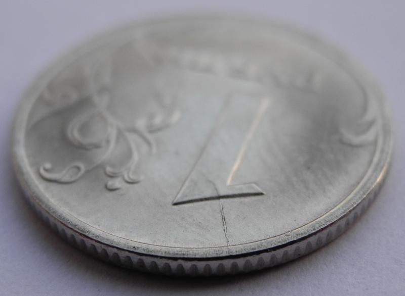 1 рубль банка России. Неполный раскол